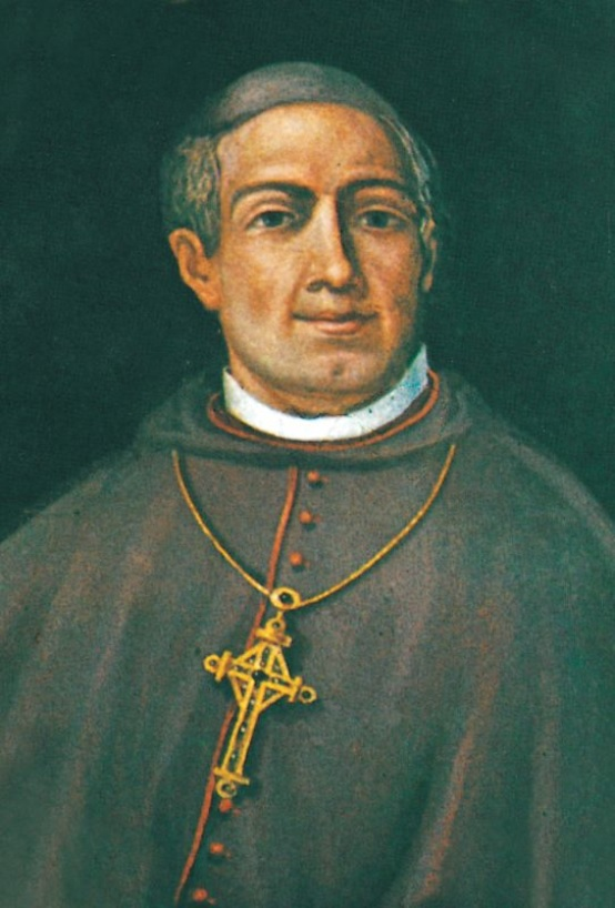 Imagen ficticia de Alonso III de Fonseca, arzobispo de Santiago de Compostela y de Toledo.